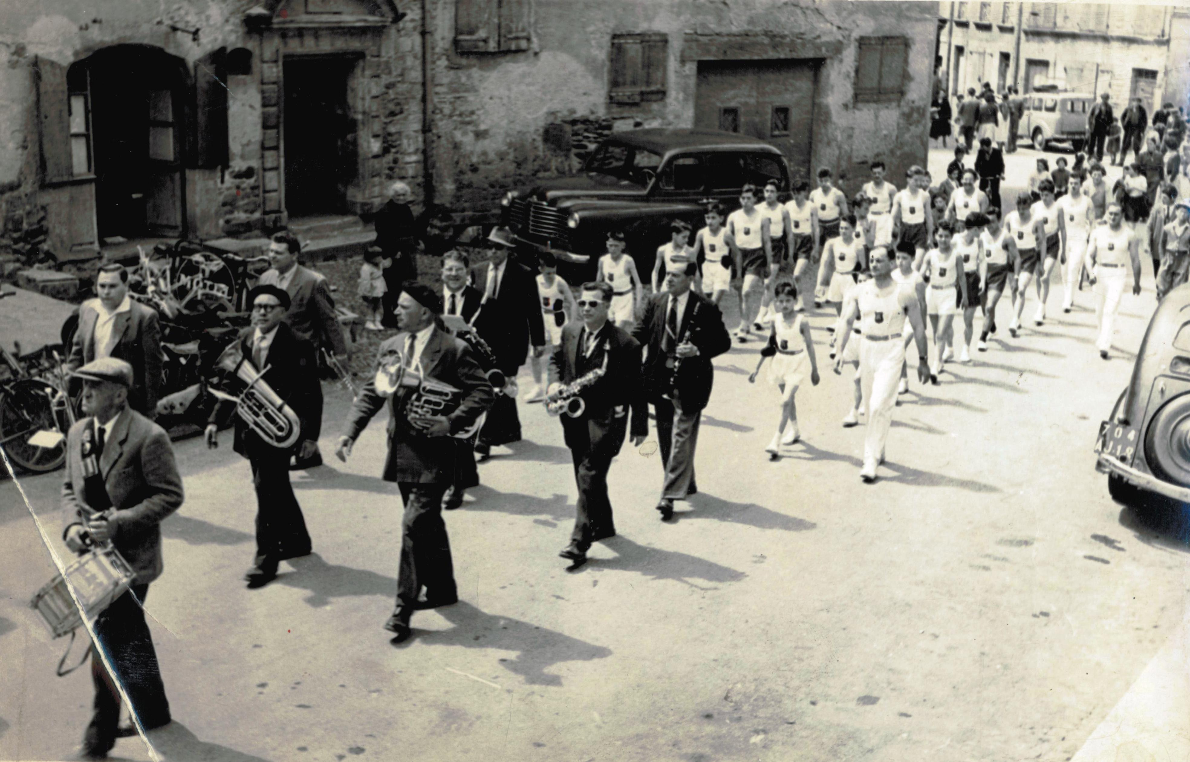 Rare photo du défilé de la libération en août 1944 avec la Lyre decazevilloise.